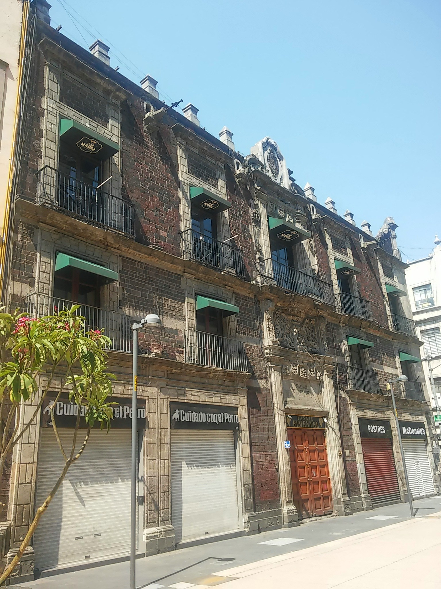 Casa del Marquesado del Prado Alegre en la esquina delas calles Madero y Motolinia, en el centro histórico de la ciudad de México